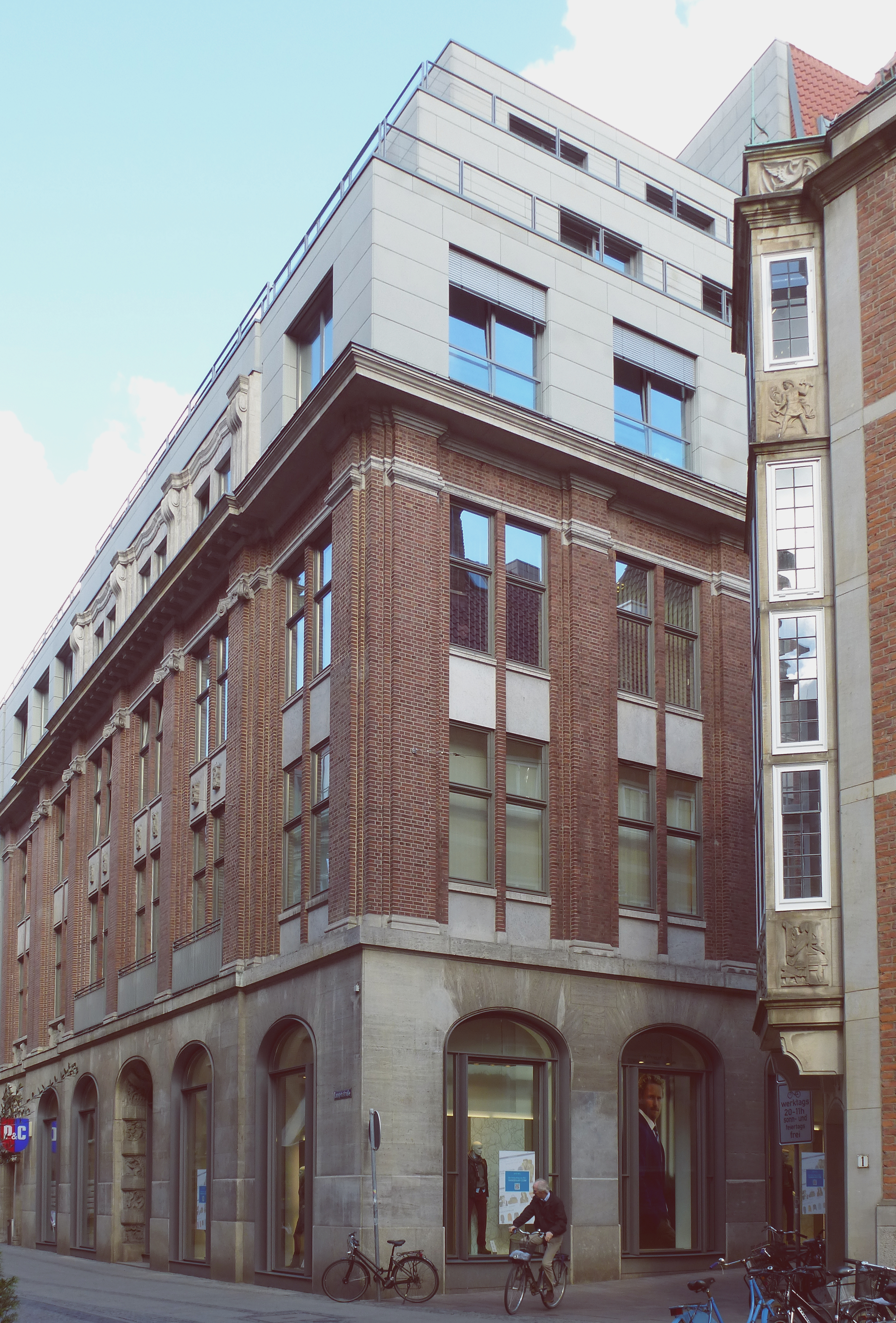 Bank für Handel und Gewerbe, Bankverein für Nordwestdeutschland, Bremer Bankverein in Bremen, Langenstraße 3Das abgebildete Objekt ist ein geschütztes Kulturdenkmal in der Freien Hansestadt Bremen, mit der Nr. 0954 beim Landesamt für Denkmalpflege registriert.